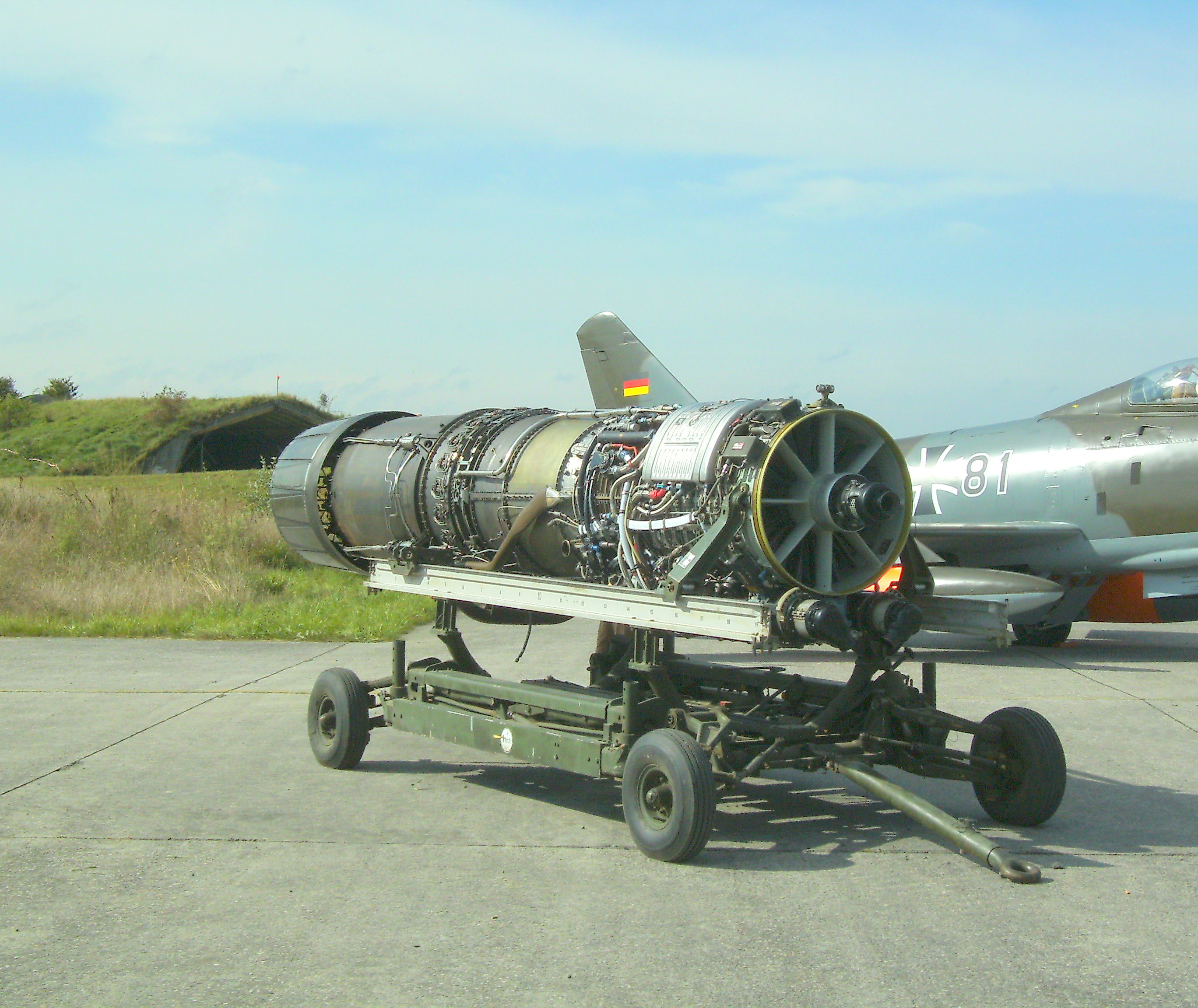 Tag der offenen Tür Allgäu Airport 2008 - Triebwerk F 104